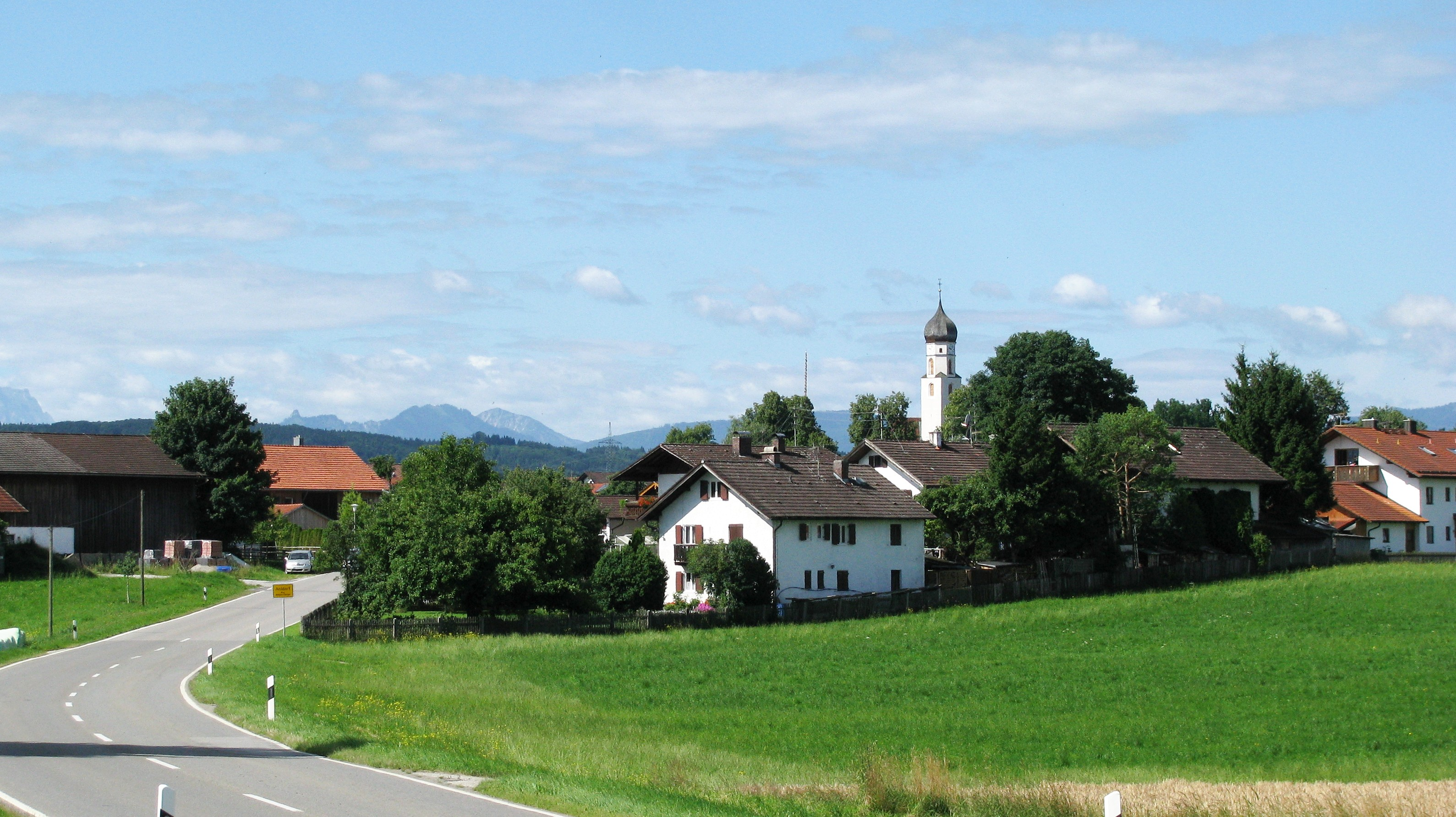 Nordöstliche Ortseinfahrt von Antdorf im Landkreis Weilheim-Schongau (St 2038).